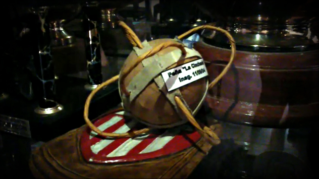 Imagen de una pelota del deporte "el pato", tomada en el campo hípico y de pato, llamado "Barracas al Sur" ubicado en la localidad de Avellaneda. En esta foto podemos ver las manijas que tiene la pelota que, antiguamente, se jugaba con un pato vivo dentro de una bolsa de cuero, por eso su nombre. Este deporte se encuentra declarado como deporte nacional, más allá de que no se practique.